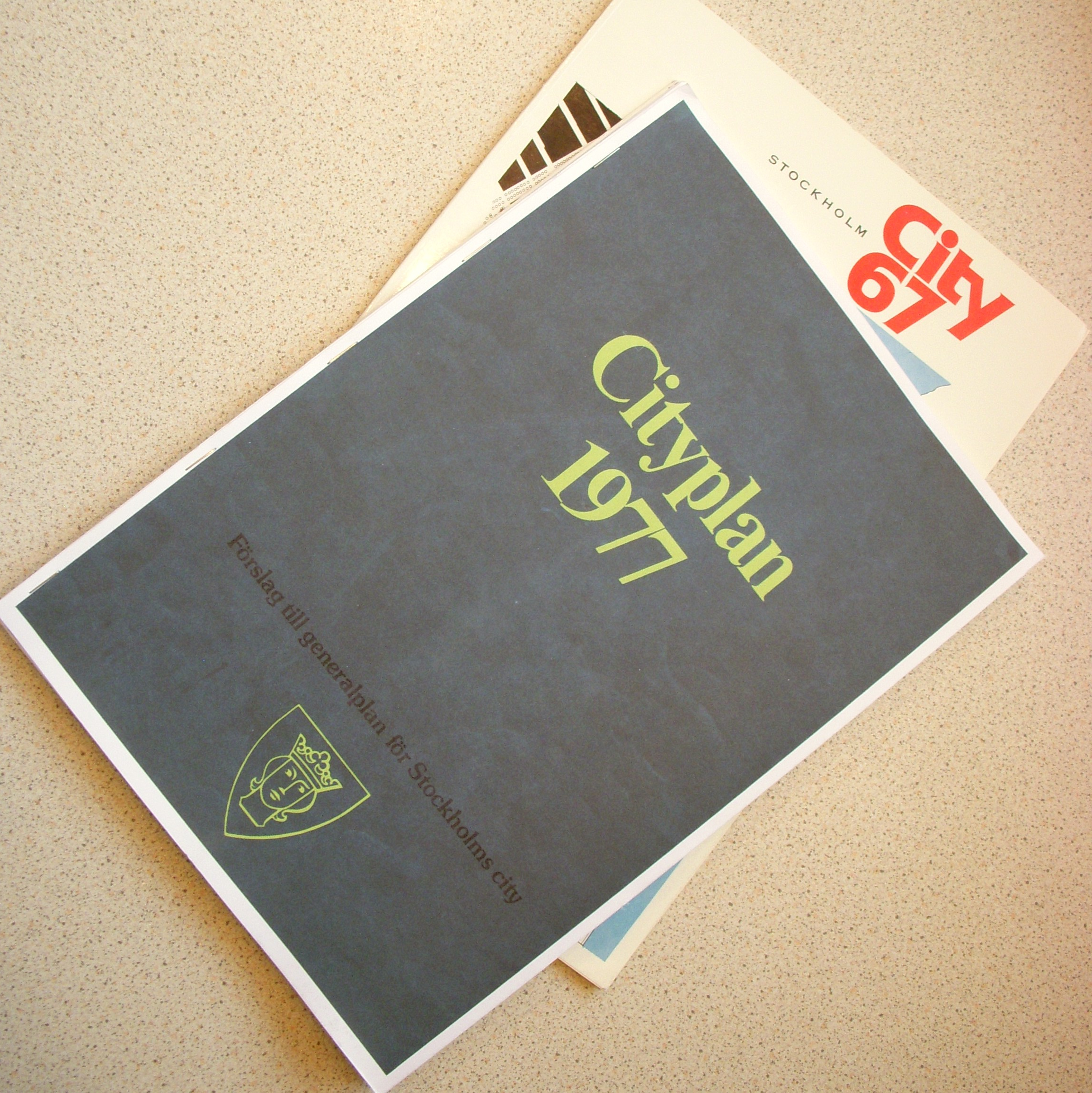 Cityplan 1977, förslag till generalplan för Stockholms city som avlöste "City 67".